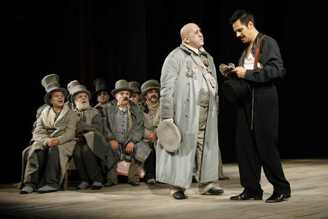 Moja fotografija.